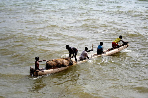 Best viewed large